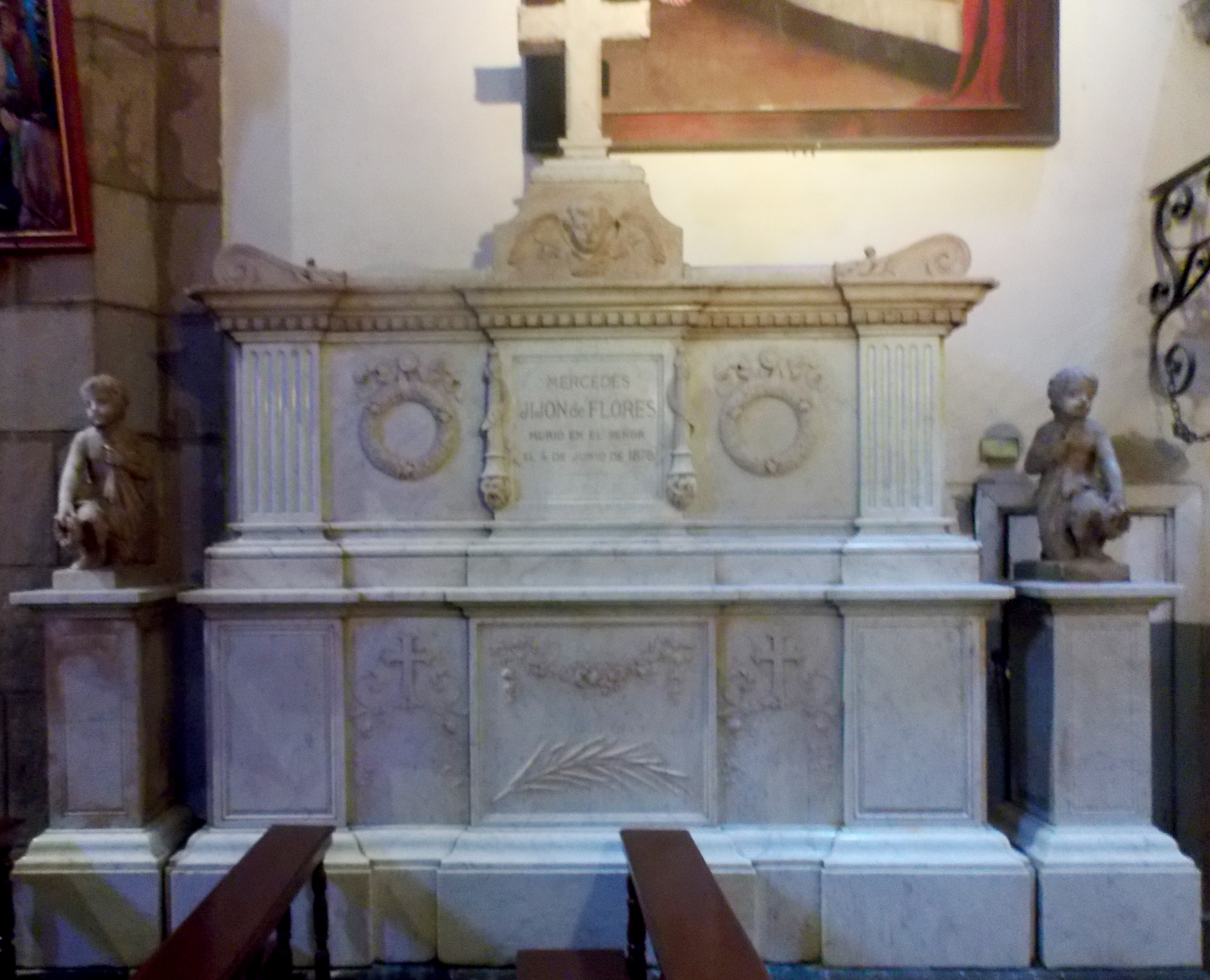 Cenotafio en la Catedral Metropolitana de Quito (Ecuador), que recuerda que la primerísima Primera Dama de Ecuador, Mercedes Jijón de Vivanco, se encuentra enterrada en la cripta subterránea del templo.